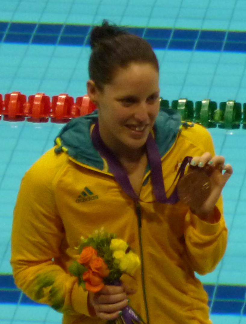 Dana Vollmer, Lu Yings y Alicia Coutts